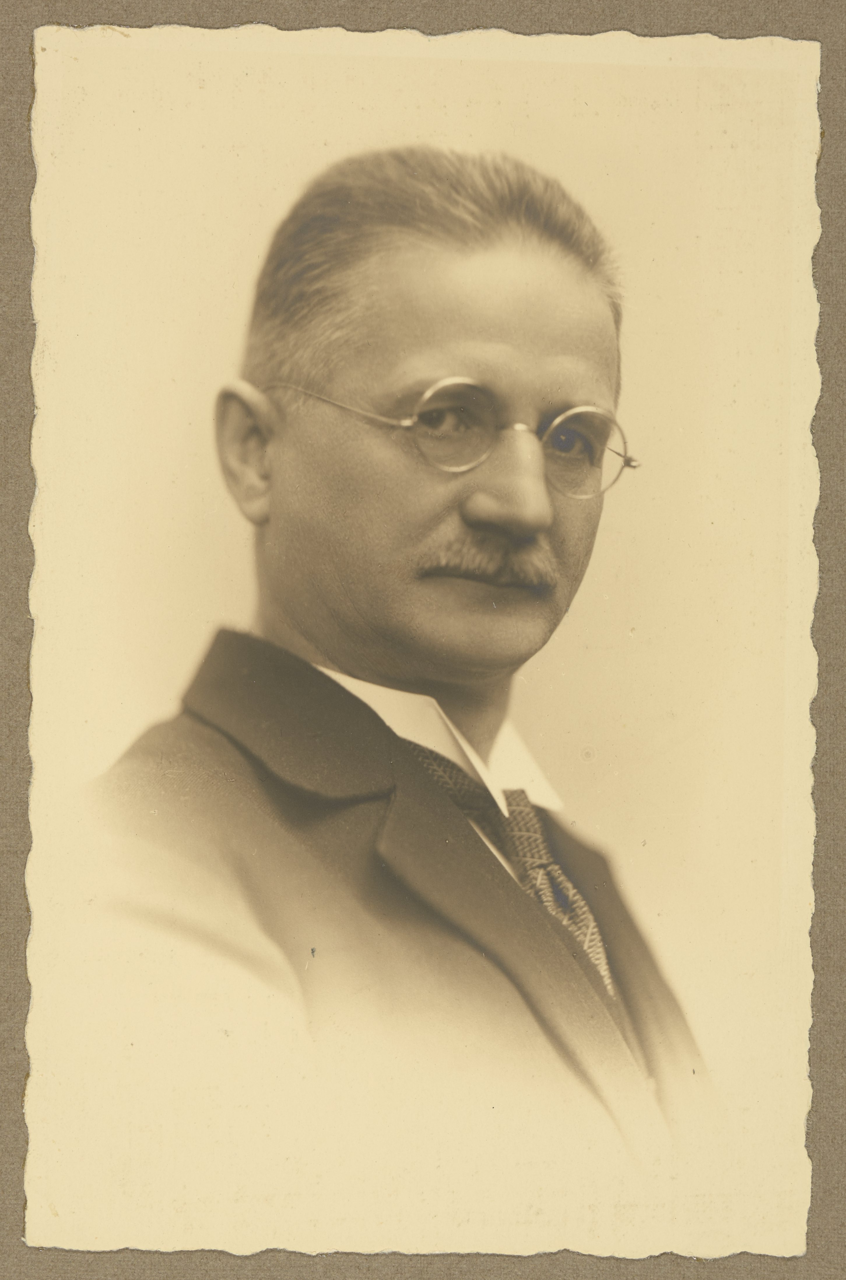 Franciszek Maślanka, wizerunek sprzed 1932 r.